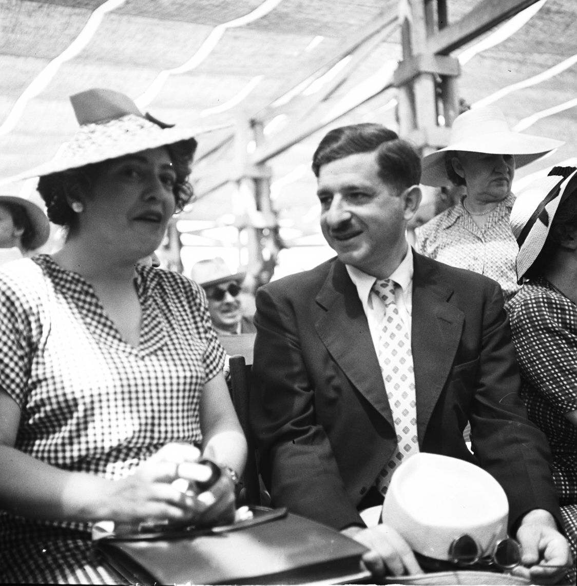 אוסף צילומים של הצלם זולטן קלוגר טווח מספרי התשלילים 27739 - 27796: הנחת אבן הפינה למכון וייצמן, מדענים - פרופסור דיוויד ריטנברג